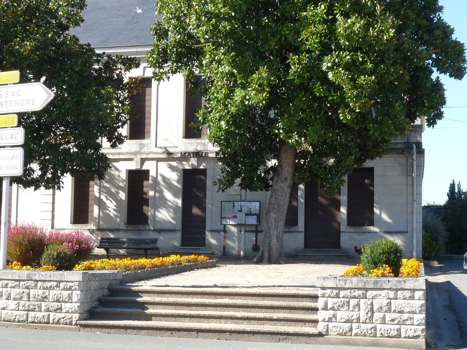 Mairie de Donnezac, Gironde, France